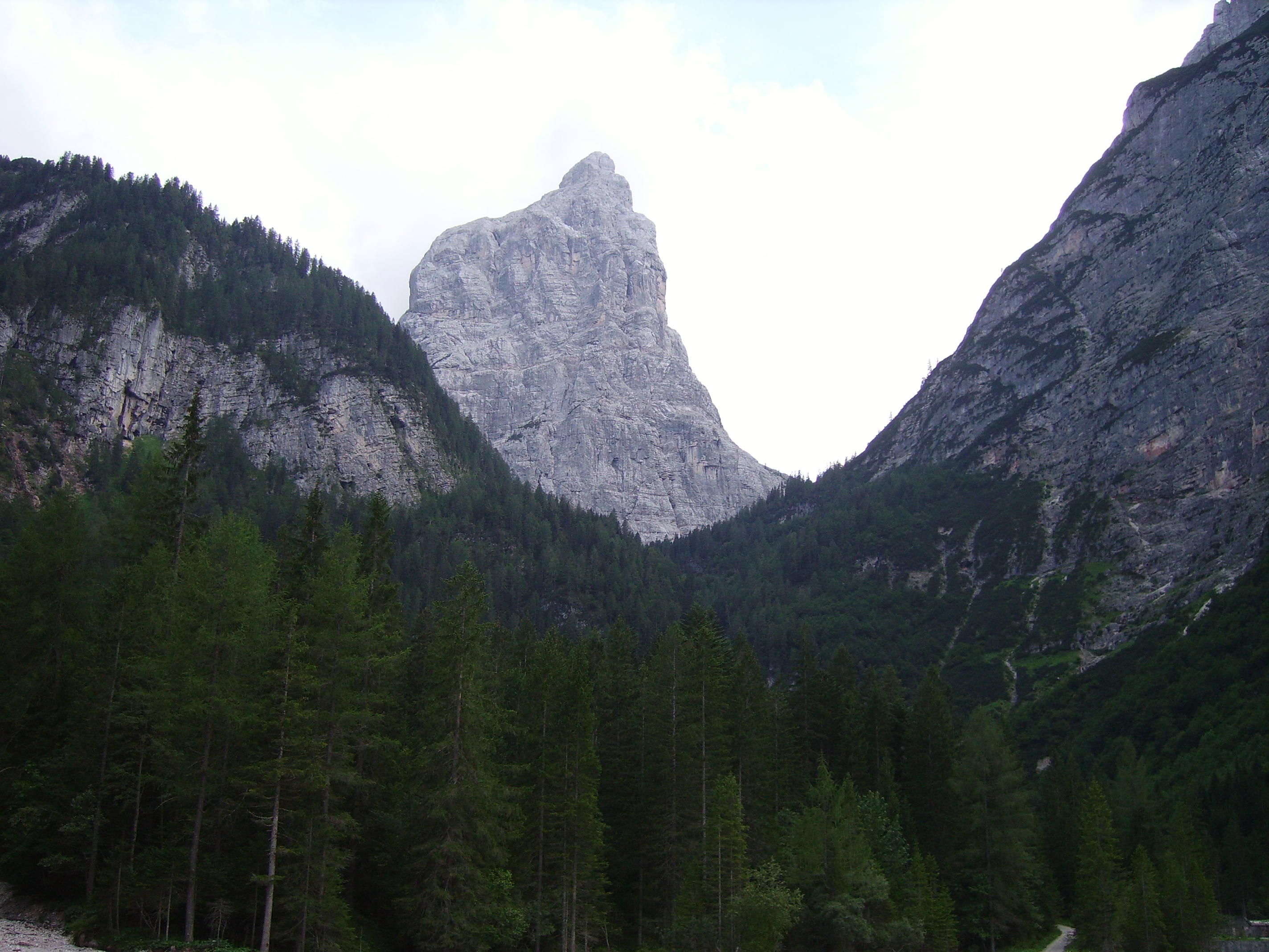 Il Corno del Doge (2615 m), all'interno della Riseva naturale di Somadida (Auronzo di Cadore, Belluno)